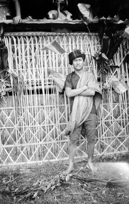 Negatief. Een man in Toraja adatkleding, Mamasa, Sulawesi